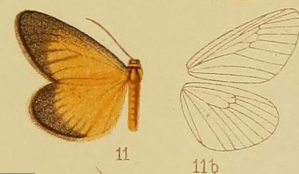 Thermochrous fumicincta